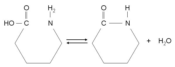 לקטם, הופק על-ידי Pixie